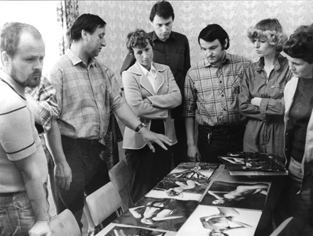 Fotowochenende in Sohrmühle, 1984.Fotograf: Harald Börner.